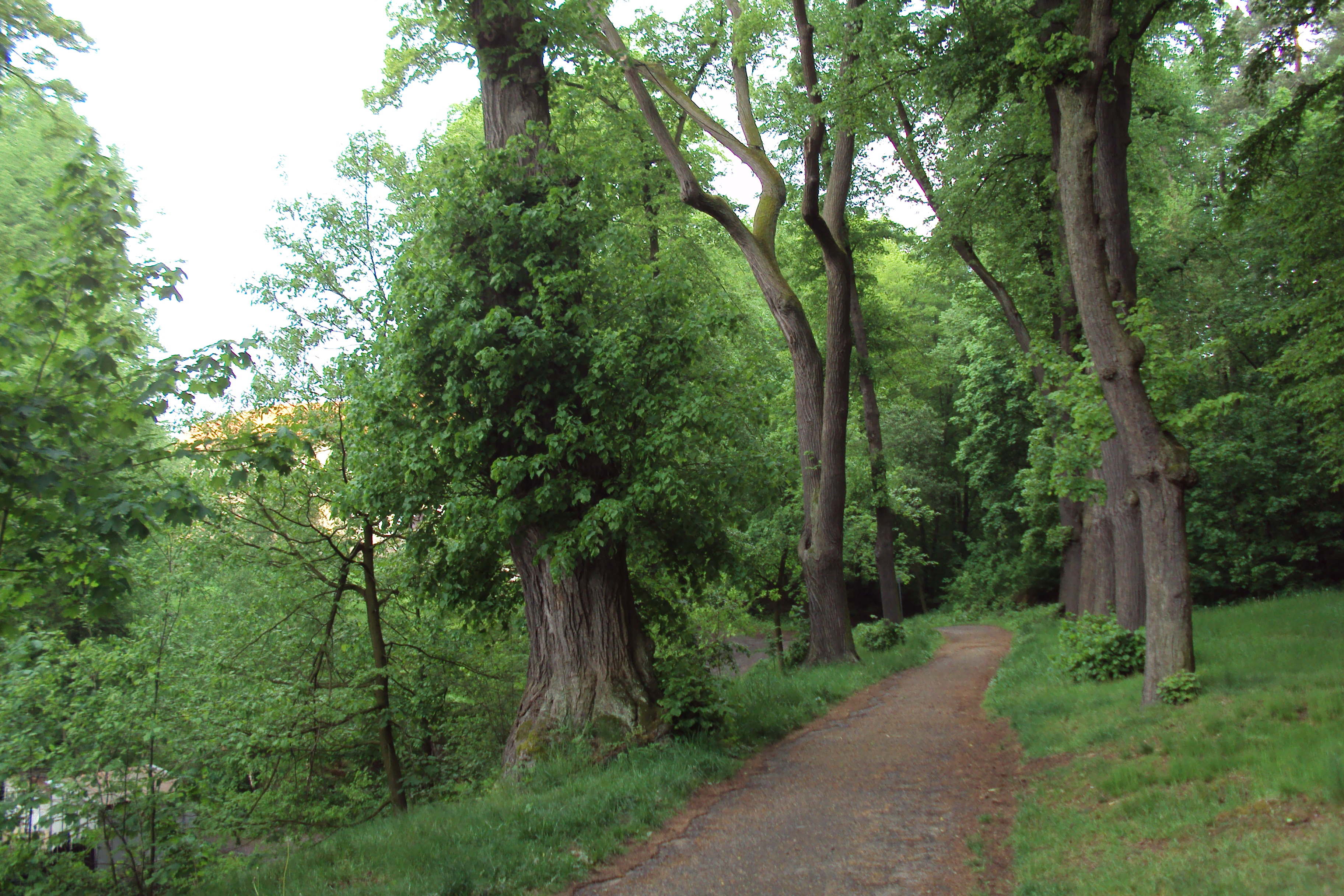 Alej k zámku Vartenberg ve Stráži pod Ralskem